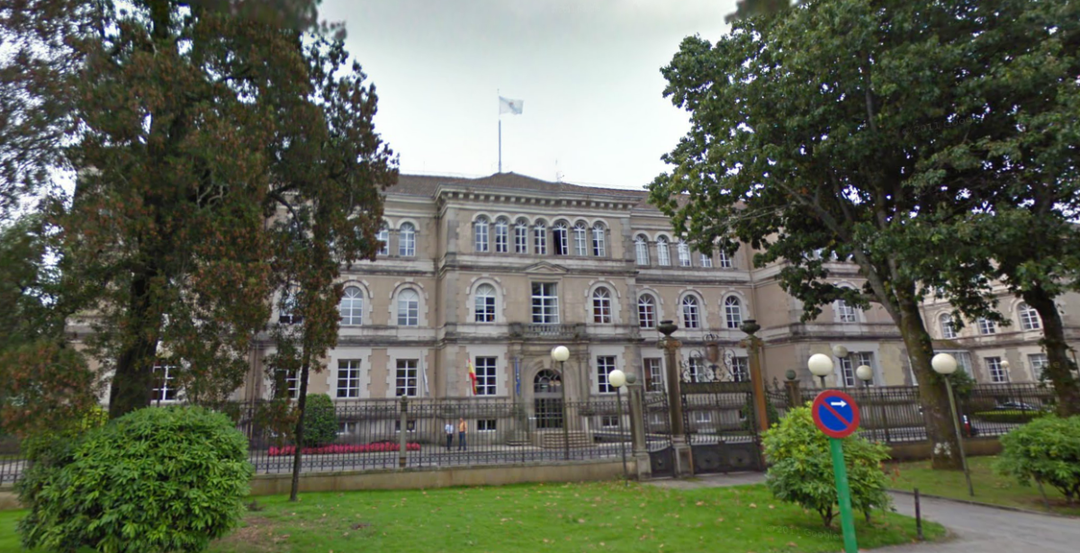 Edificio central da Xunta de Galicia de San Caetano en Santiago de Compostela.